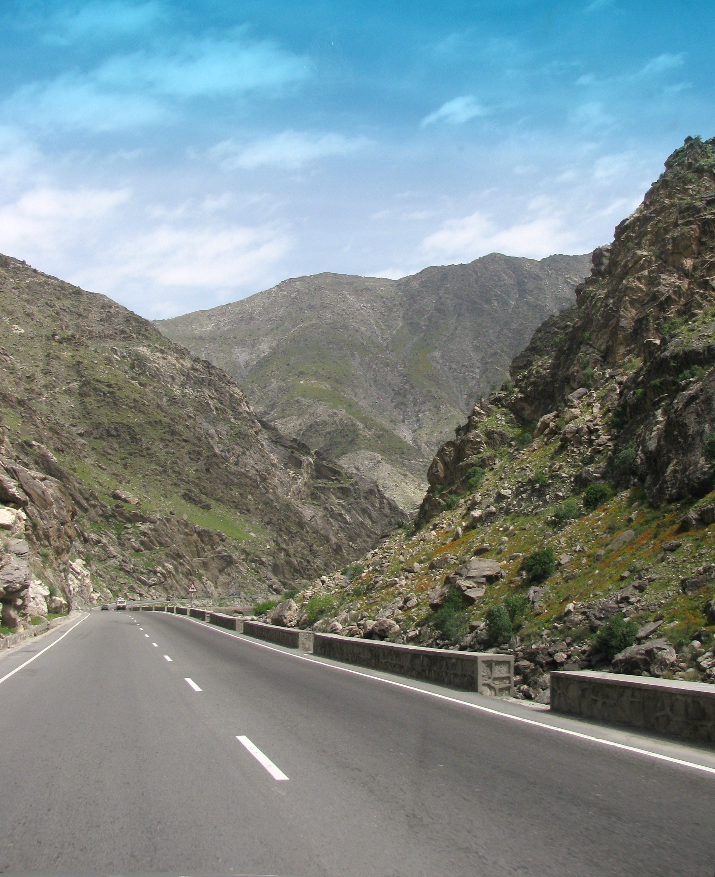 Jalalabad road